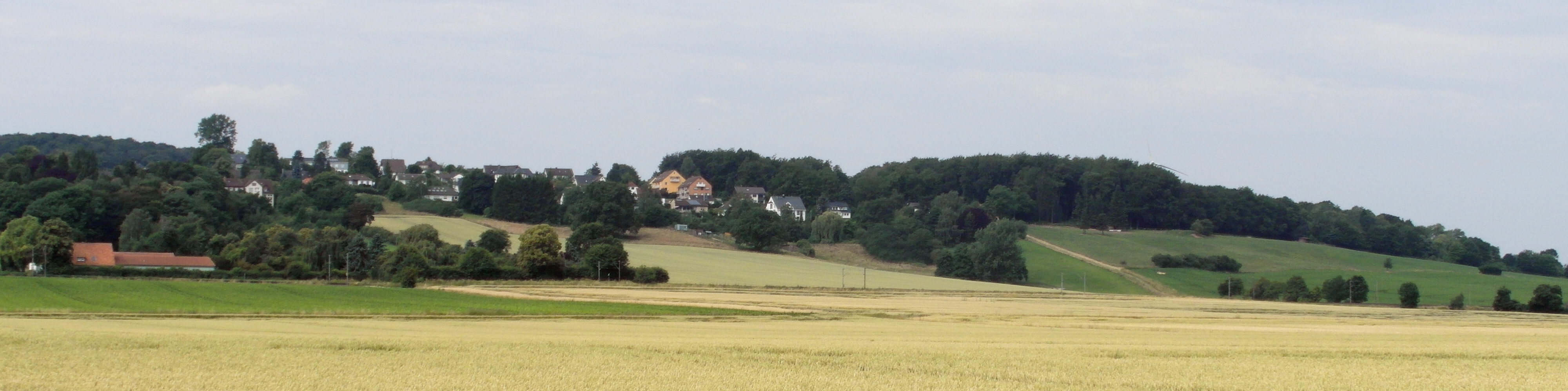 Blick nach Westen auf den Wolfsberg bei Lüdersen (Stadt Springe)